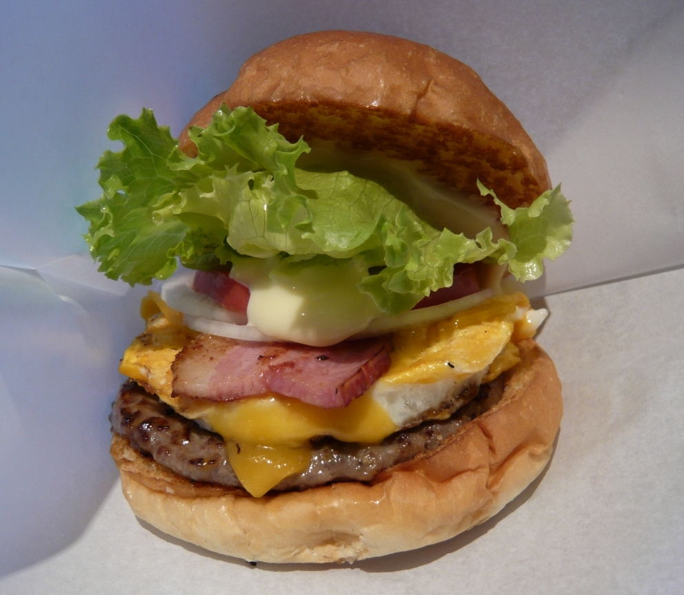 Burger